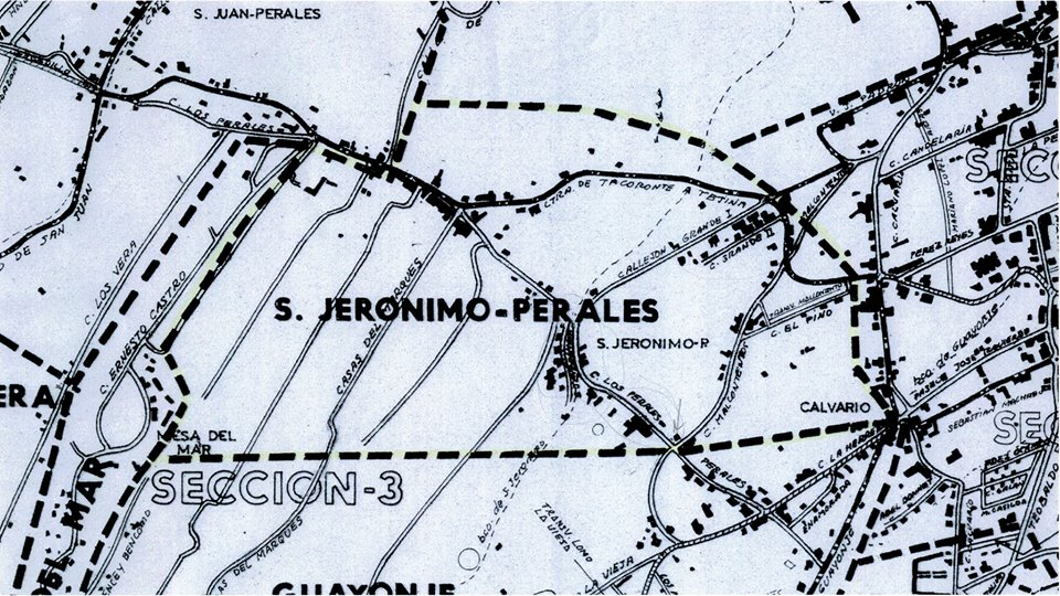 es una de las 21 entidades singulares de población del municipio de Tacoronte que cuenta con 519 habitantes según el Padrón Municipal de Habitantes a 1-1-2014 (el 2,2% del total municipal de 23.929 habitantes), que se distribuyen en 251 hombres y 268 mujeres. Se trata de una localidad que ha reducido en aproximadamente una quinta parte el número de sus efectivos demográficos desde 2001. La entidad abarca 84 hectáreas (0,84 km2), el 2,79% de la superficie municipal. La población residente ha nacido en su mayor parte en Tacoronte (48,2%), siendo la aportación principal de otros municipios de la isla de Tenerife y casi testimonial la procedente de otros lugares del Archipiélago, la Península o el extranjero.